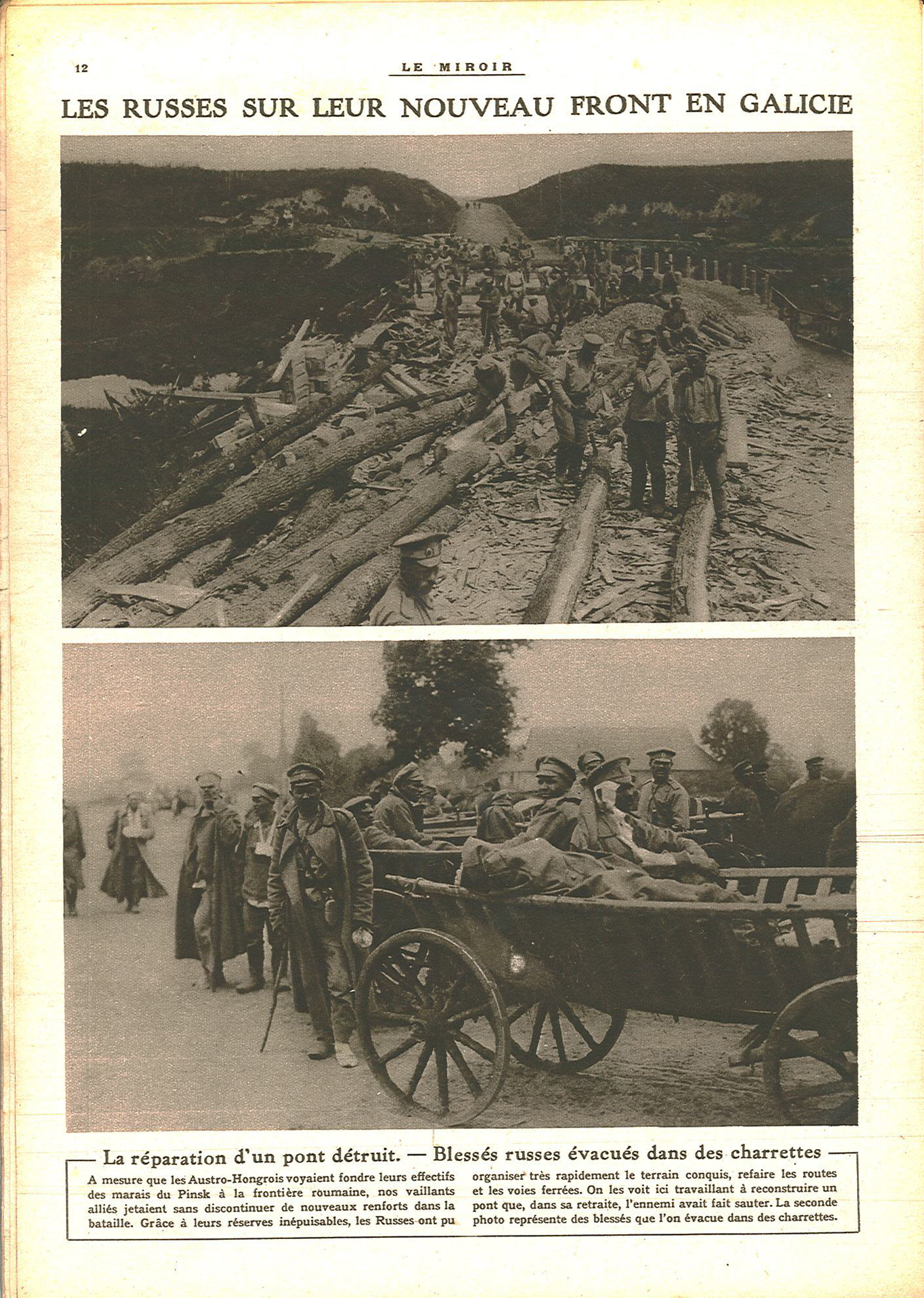 Le Miroir, n°141. 6 août 1916.